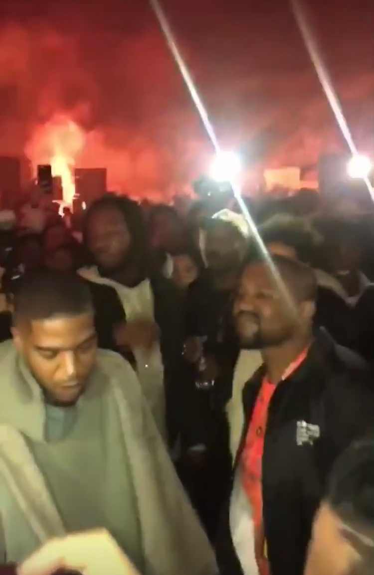 Bilde fra KIDS SEE GHOSTS listening party. Lokasjon: Santa Clarita, California